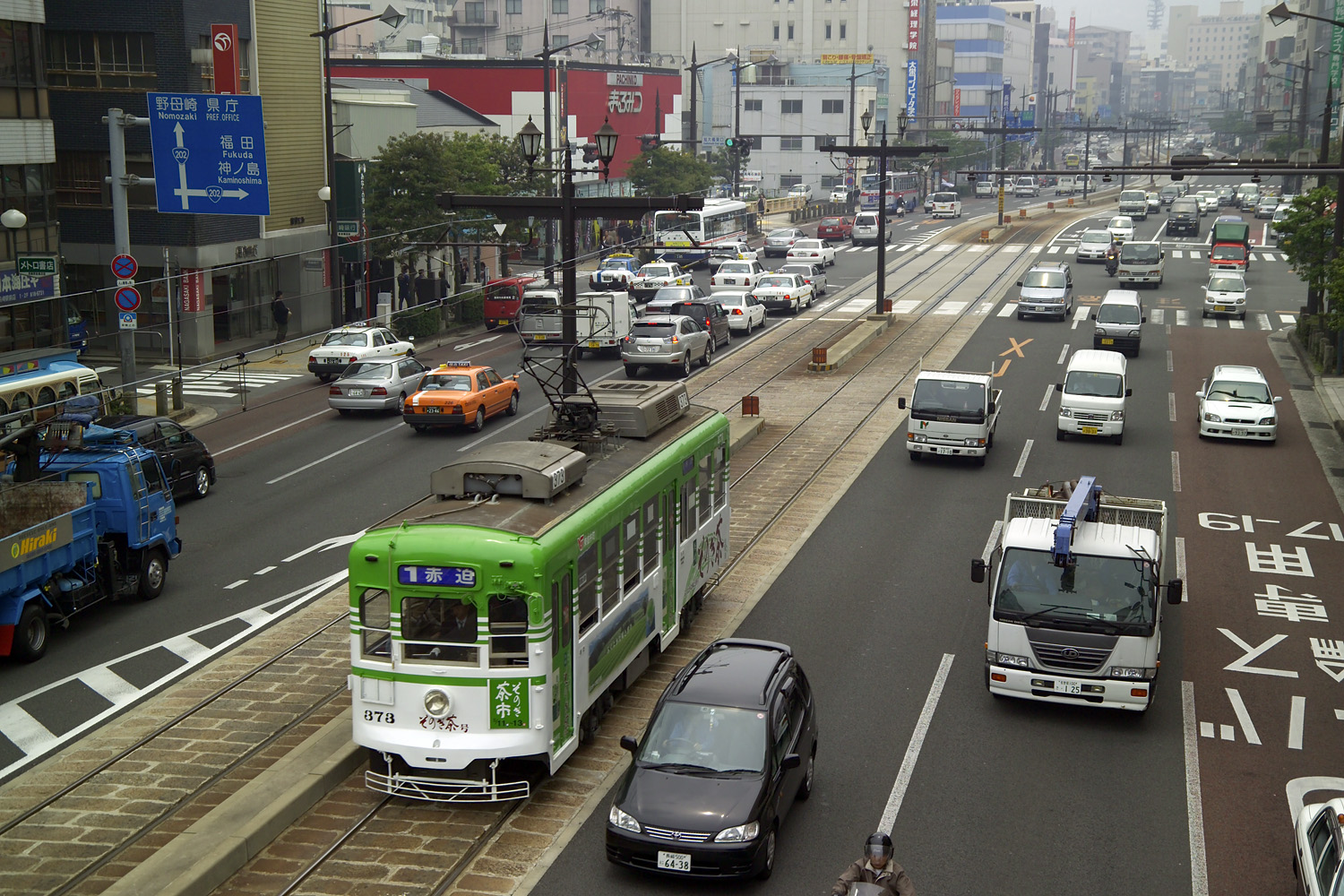 Trolley car of Nagasaki Electric Tramway, Nagasaki, Nagasaki, Japan